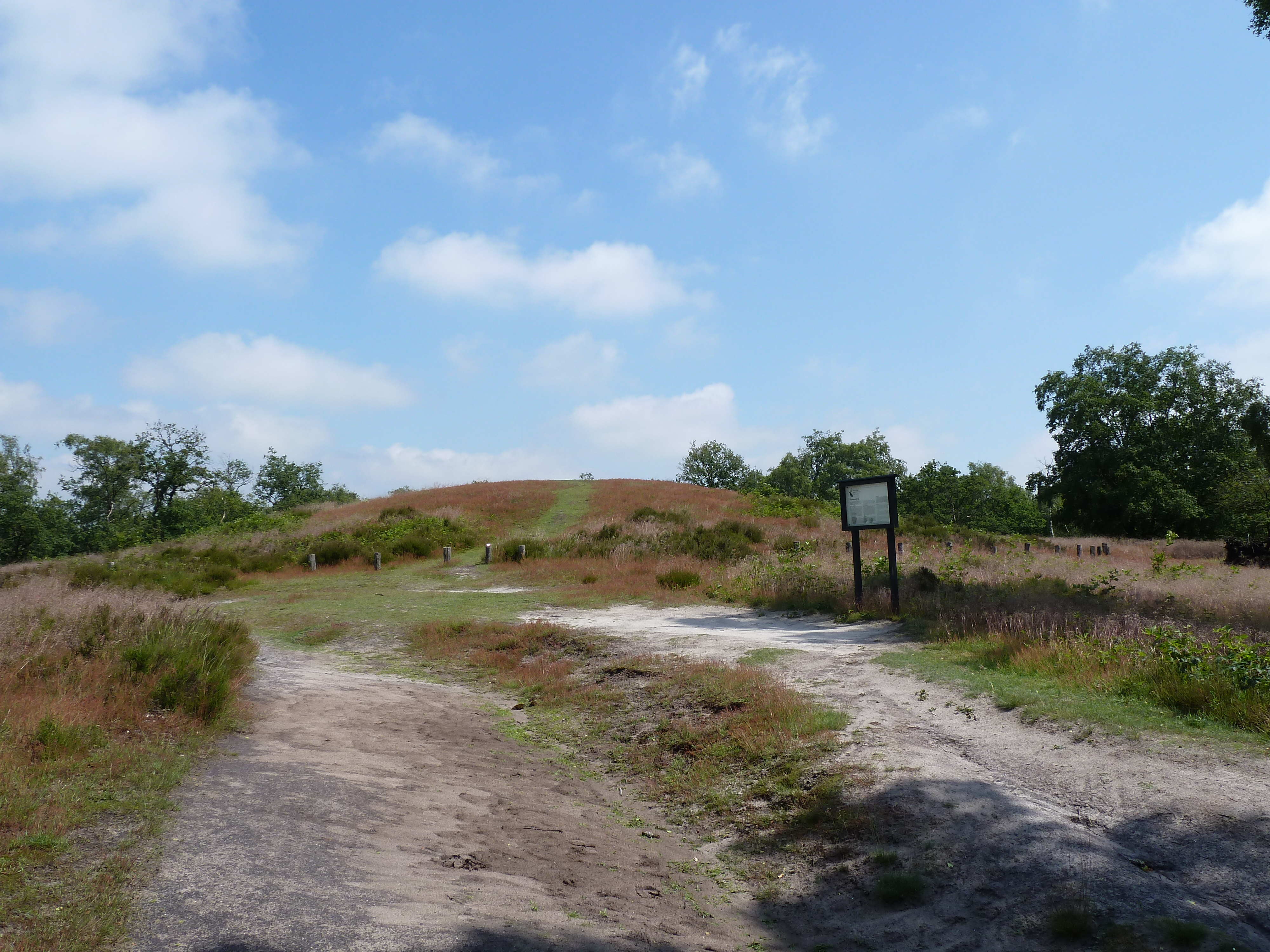 Vorstengraf, De Hamert, Bergen, Limburg, Nederland